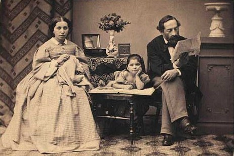 Salomon Ruben "Sally" Henriques (1815-1886), Rose Henriques, née Jacobsen (1830-1891), and daughter Jorikka Becker, née Henriques (1858-1931)